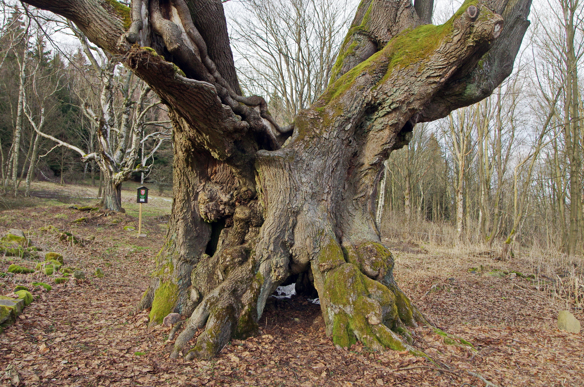 Památný strom Horní Popovská lípa, ( v pozadí památný strom Popovská bříza), okres Karlovy Vary